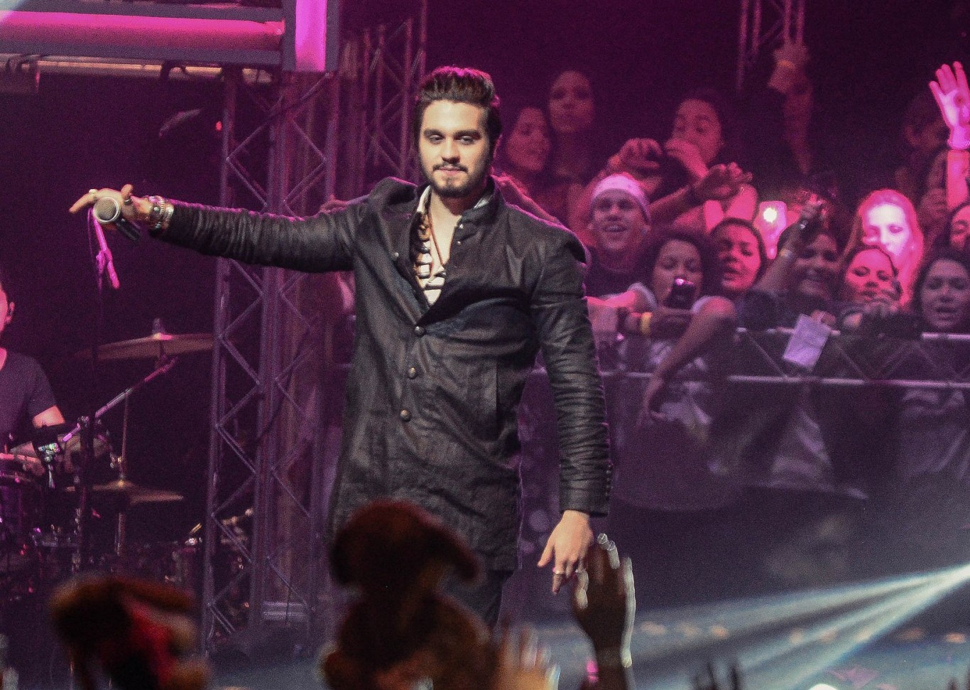 Luan Santana 2016